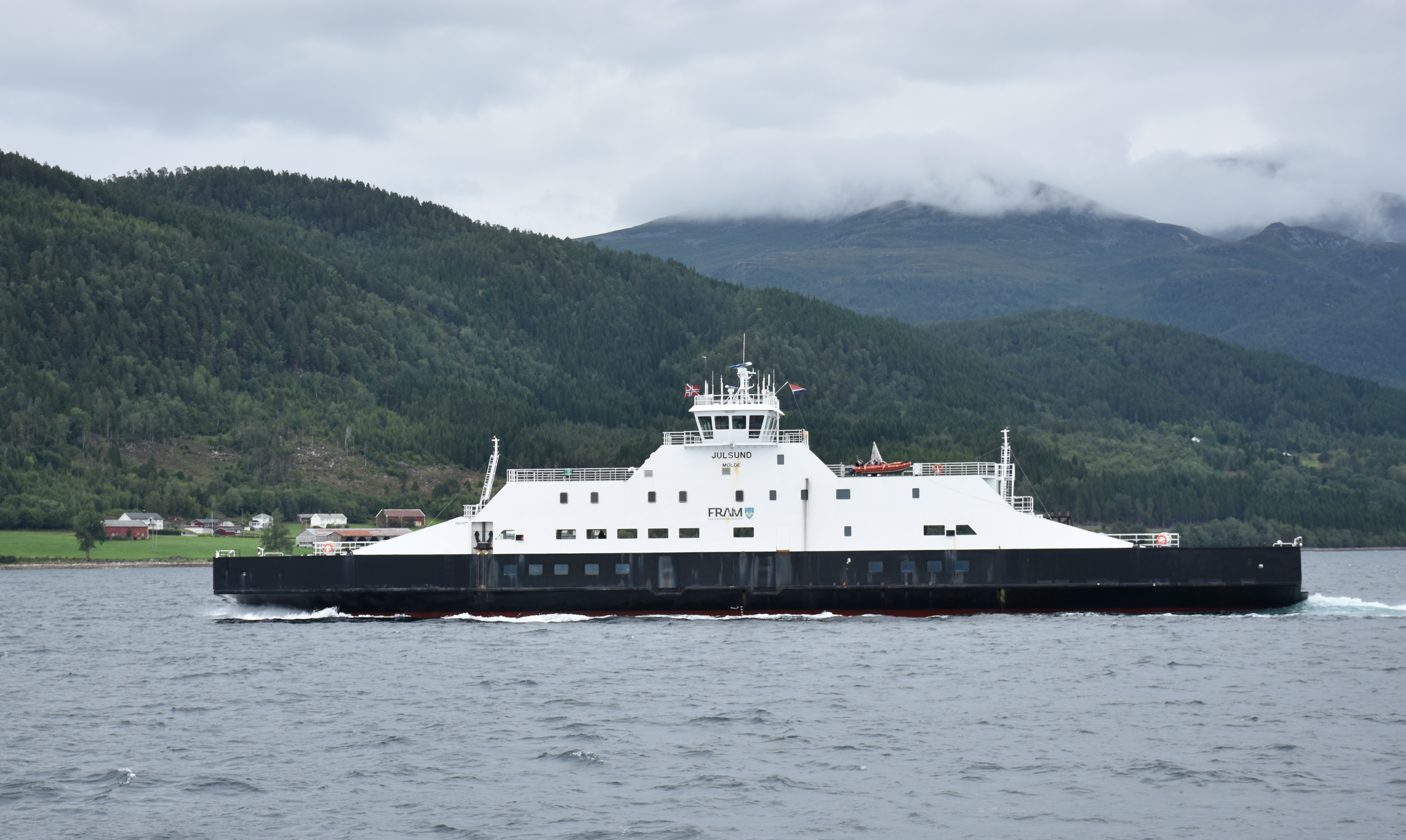 MF Julsund i trafikk på strekningen Sølsnes-Åfarnes